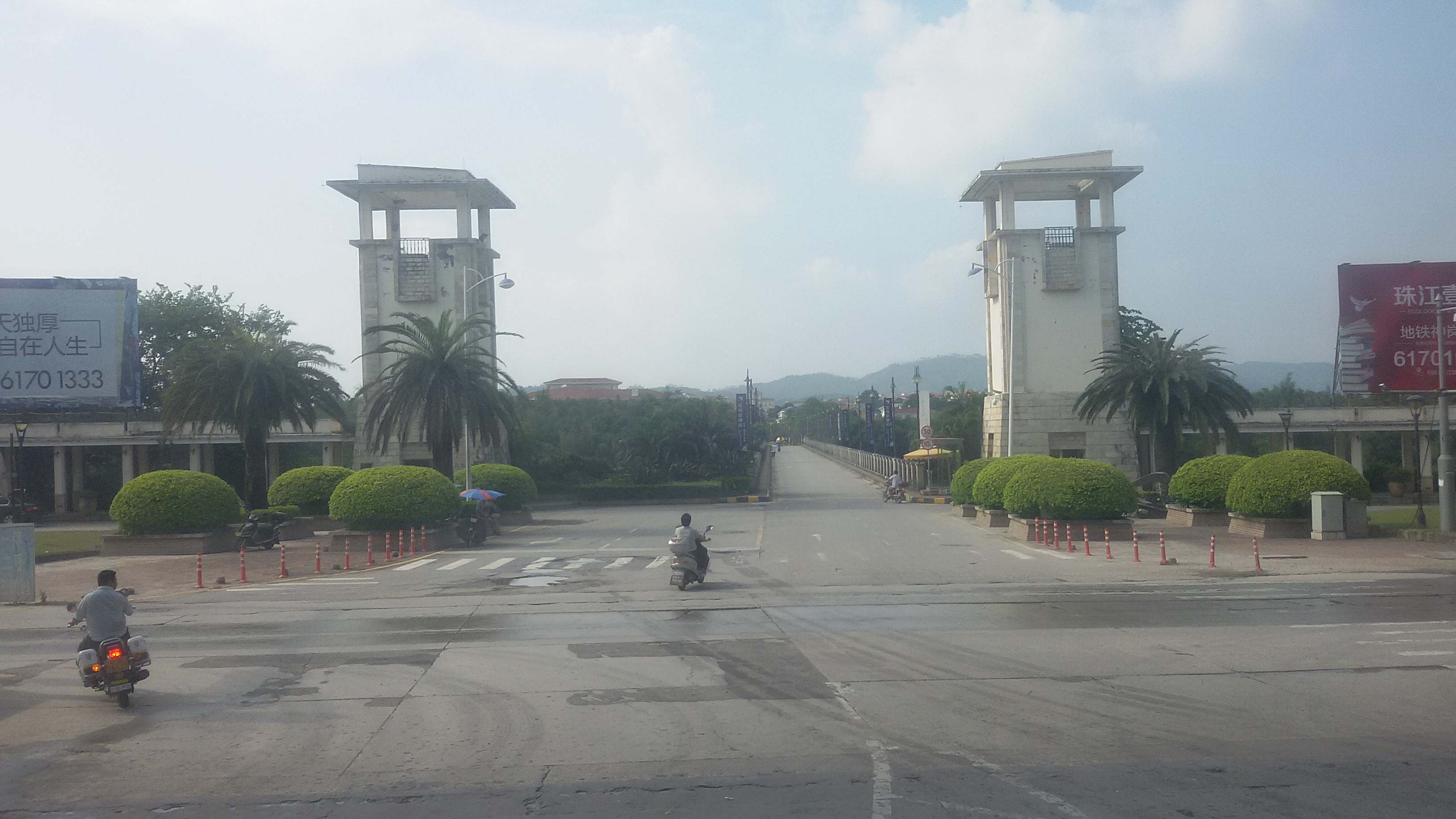 粵語: 東方夏灣拿大門